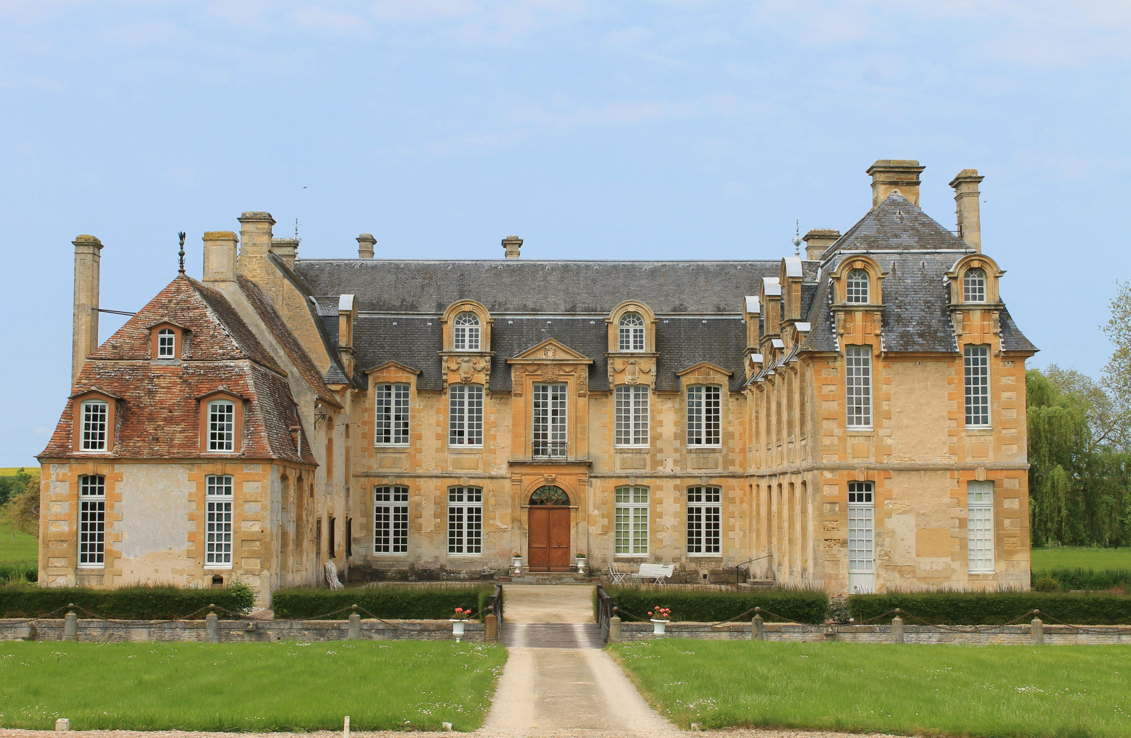 Château de Carel du XVIe avec toits à la Mansart à Saint-Pierre-sur-Dives (Calvados)